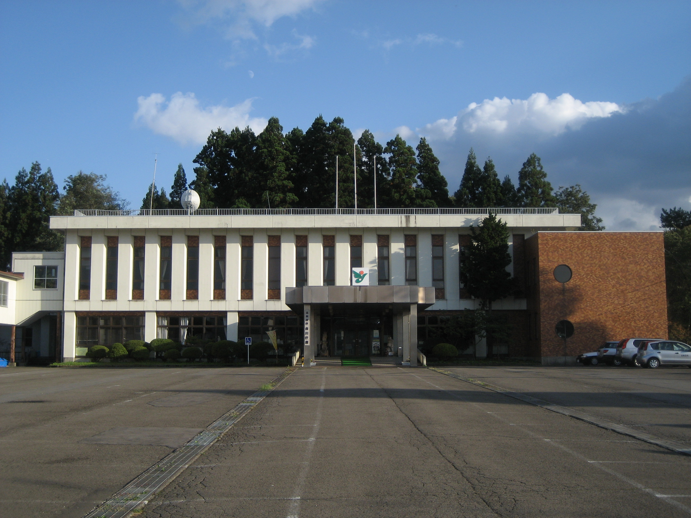 北秋田市役所合川庁舎（旧合川町役場）